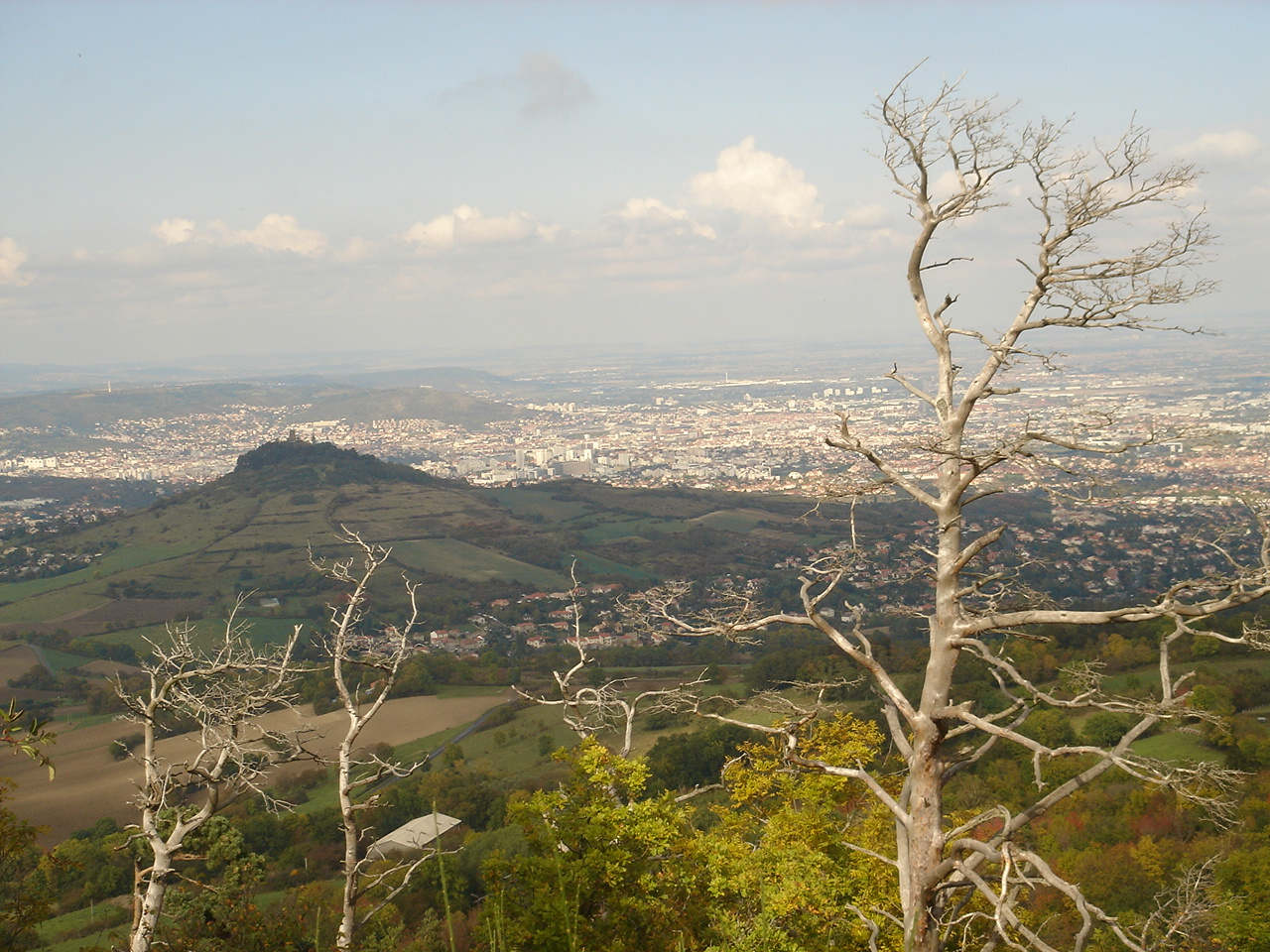 Romagnat, au premier plan au pied du Montrognon, et avec Clermont-Ferrand en arrière plan.